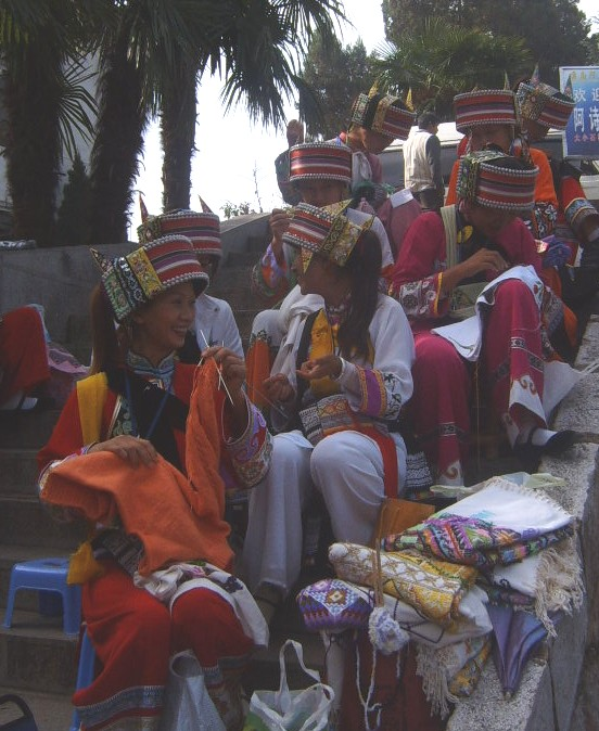 Yi (peuple) women